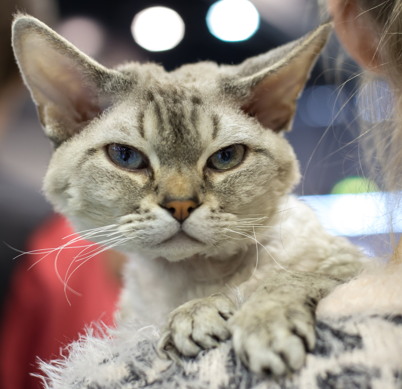 SC Mirexin Cassius, devon rex mâle présenté en exposition féline à Tampere en Finlande. Couleur : Noir silver tabby colourpoint tonkinois Code FIFé : SC Mirexin Cassius (Olli) [DRX ns 21 32] male EX1 CACS